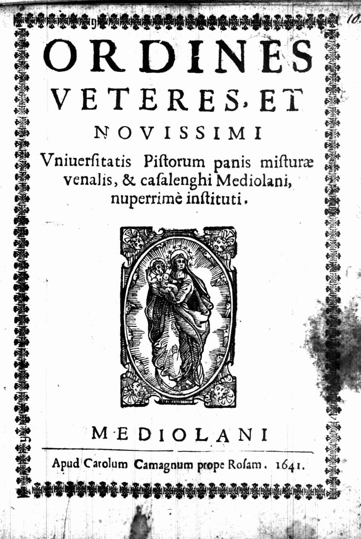 Frontespizio